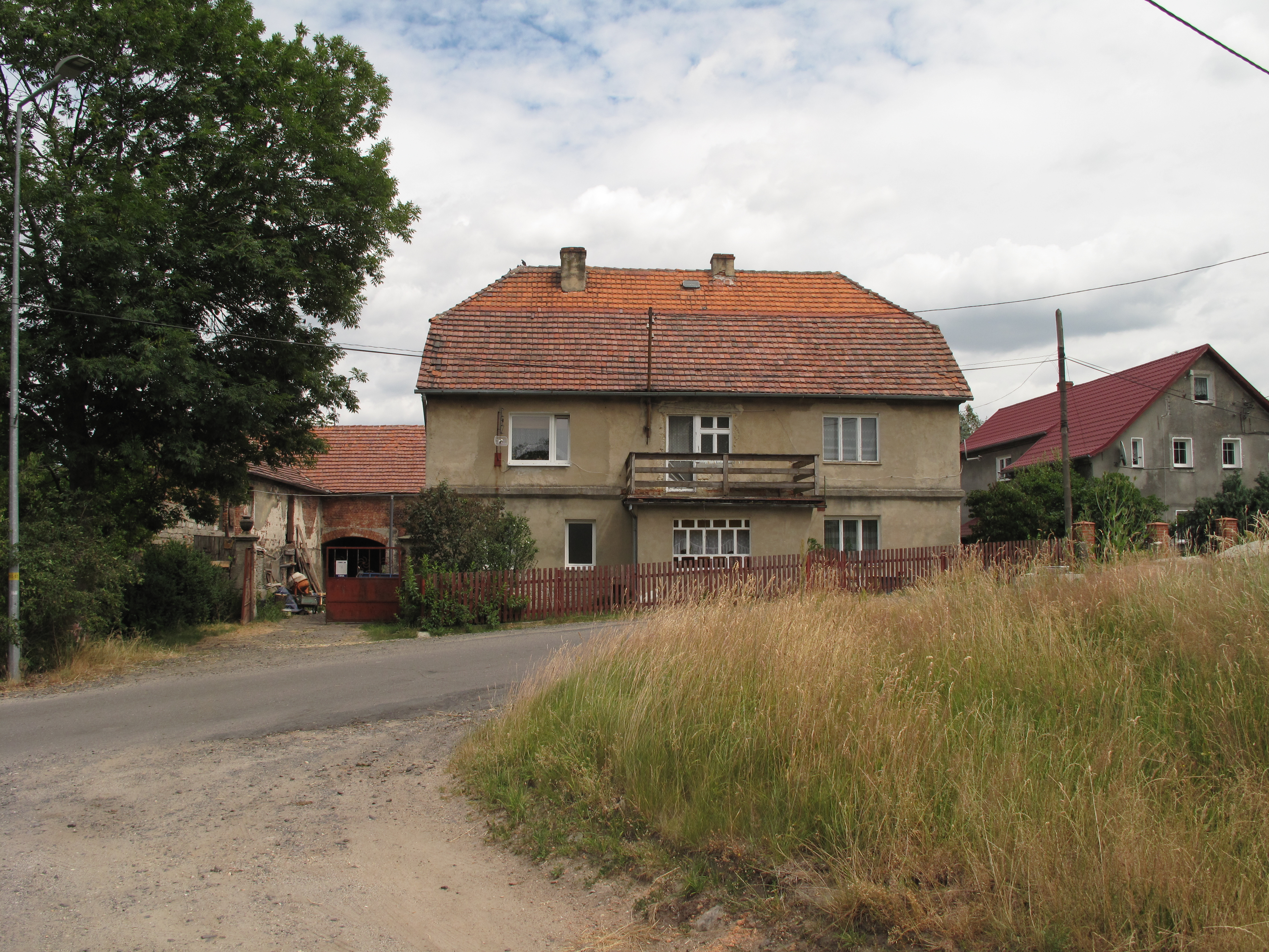 Przesieczany. Polska